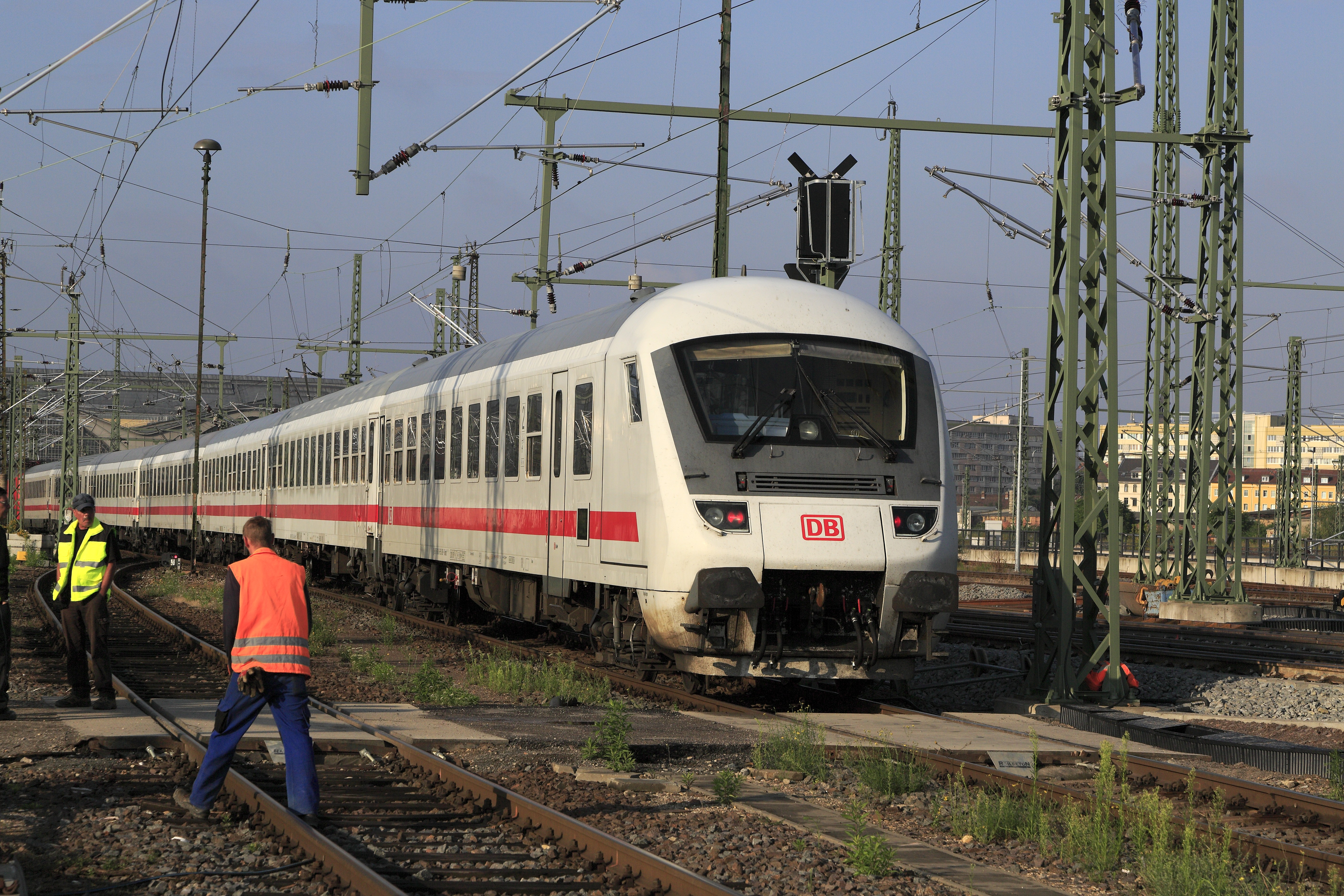 Steuerwagen eines IC-Wendezuges bei der Fahrt von der Abstellgruppe Berliner Bahnhof (»Hallesche Gruppe«) zum Bahnsteig im Umbaubereich für die Einbindung der Strecke 5919 von Eltersdorf. Nur dieses Gleis ermöglichte im Sommer 2014 Zugfahrten von der sächsischen Seite nach Norden und Westen.